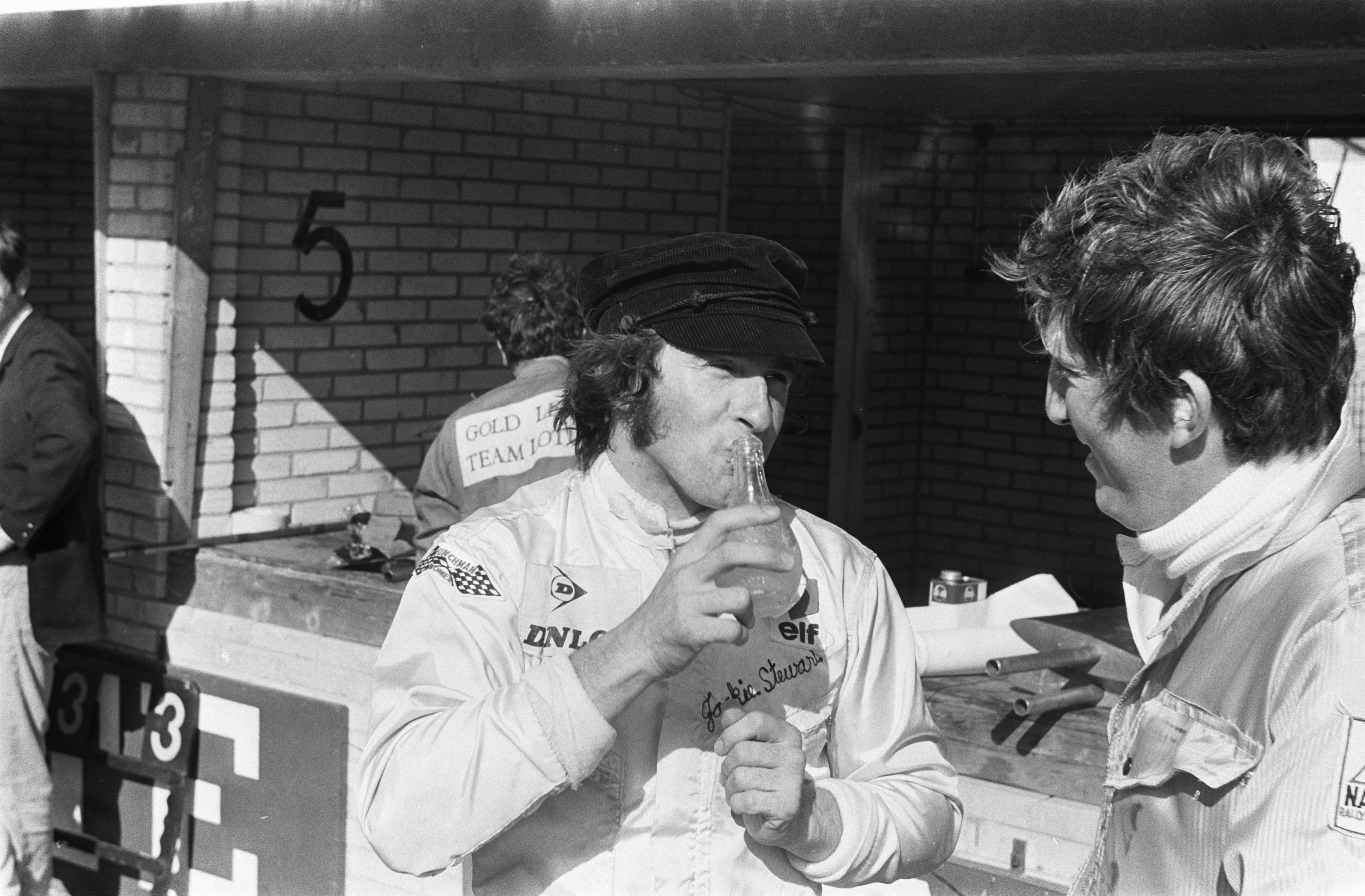 Collectie / Archief : Fotocollectie Anefo Reportage / Serie : Grand Prix Zandvoort 1969 Beschrijving : Jackie Stewart drinkt een flesje limonade Datum : 19 juni 1969 Locatie : Noord-Holland, Zandvoort Trefwoorden : autocoureurs, flesjes Persoonsnaam : Stewart, J.Y. Fotograaf : Joost Evers / Anefo Auteursrechthebbende : Nationaal Archief Materiaalsoort : Negatief (zwart/wit) Nummer archiefinventaris : bekijk toegang 2.24.01.05 Bestanddeelnummer : 922-5447 Reacties Geplaatst door Archiefhist op 27 juni 2014 - 20:19. Stewart praat in de pitbox van Lotus met mede-coureur Jochen Rindt. Geplaatst door Luc Ghys op 02 september 2016 - 14:43. Rechts is Jochen Rindt.